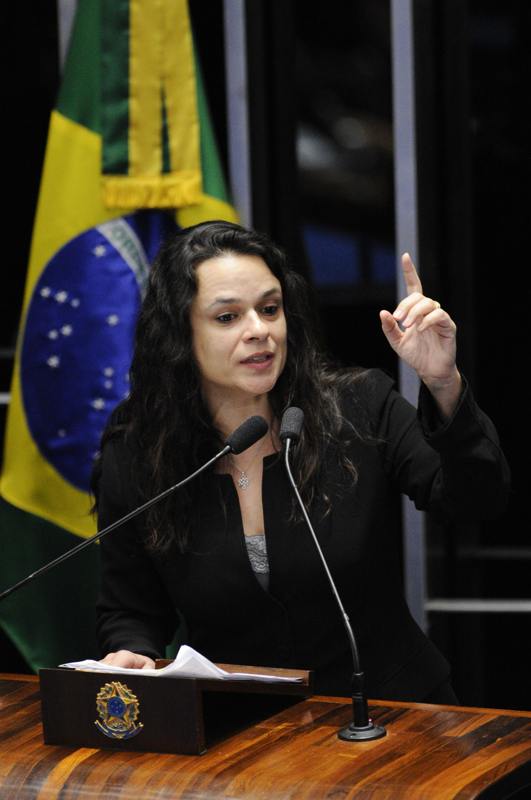 Plenário do Senado durante sessão deliberativa extraordinária para votar a Denúncia 1/2016, que trata do julgamento do processo de impeachment da presidente afastada Dilma Rousseff por suposto crime de responsabilidade. Em discurso, à tribuna, jurista Janaína Paschoal. Foto: Edilson Rodrigues/Agência Senado